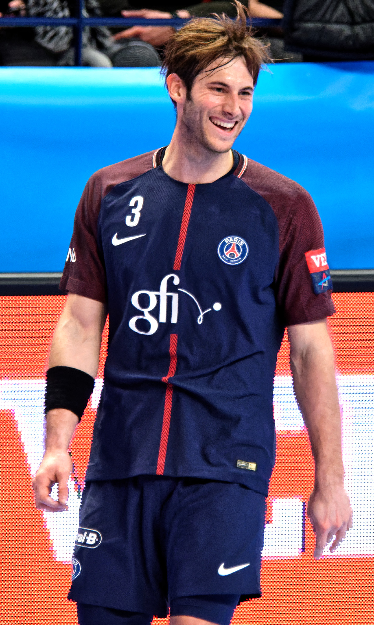 Match entre le PSG Handball et SG Flensburg. A Coubertin, le 17 février 2018.